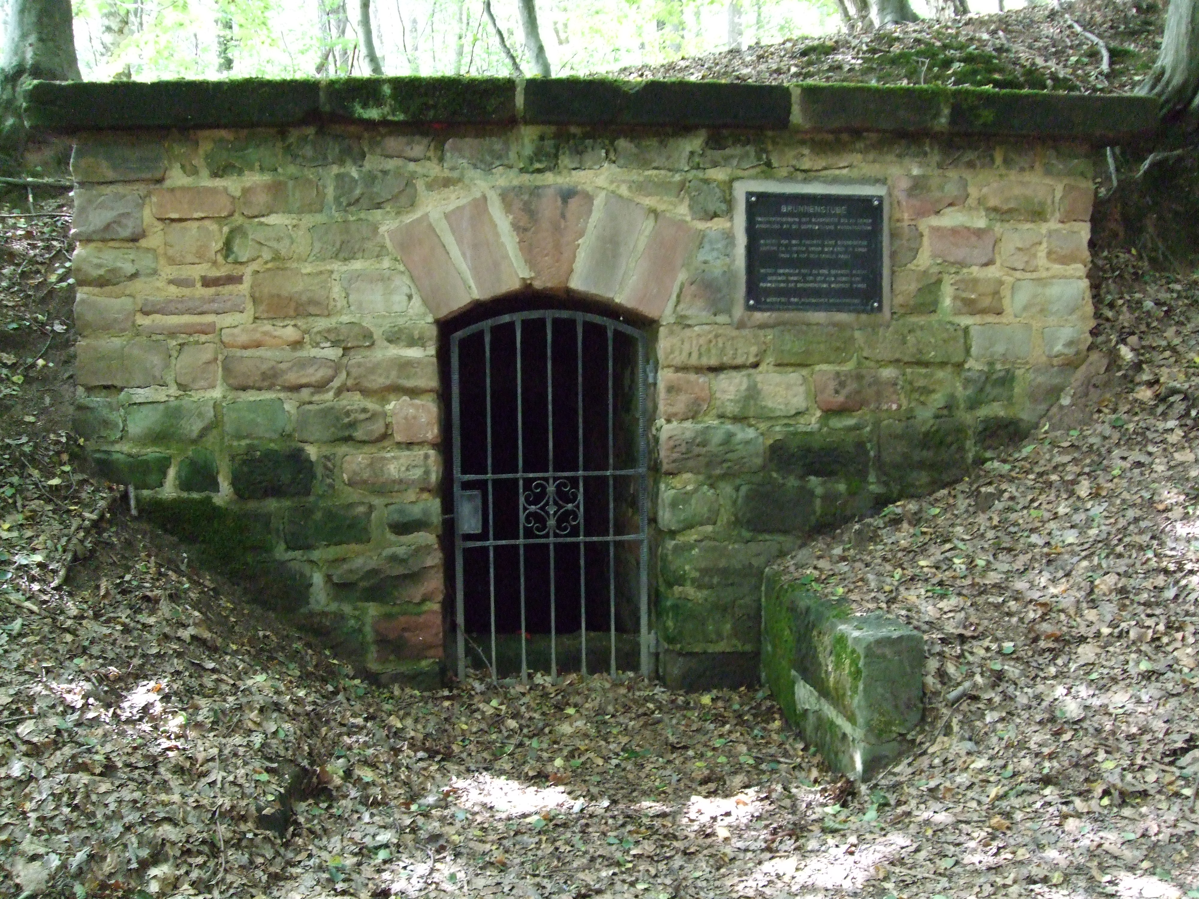 Brunnenstube nahe dem Glashütter Hof, St. Ingbert